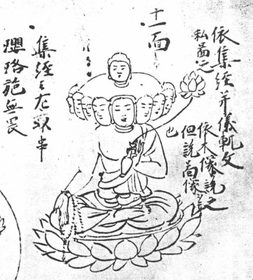 平安時代の図像集『別尊雑記』 (心覚・撰) より十一面観音。